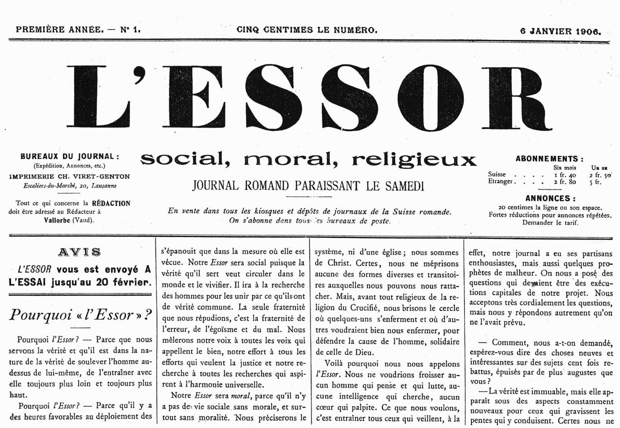 Fac-similé du premier numéro de la revue L'Essor